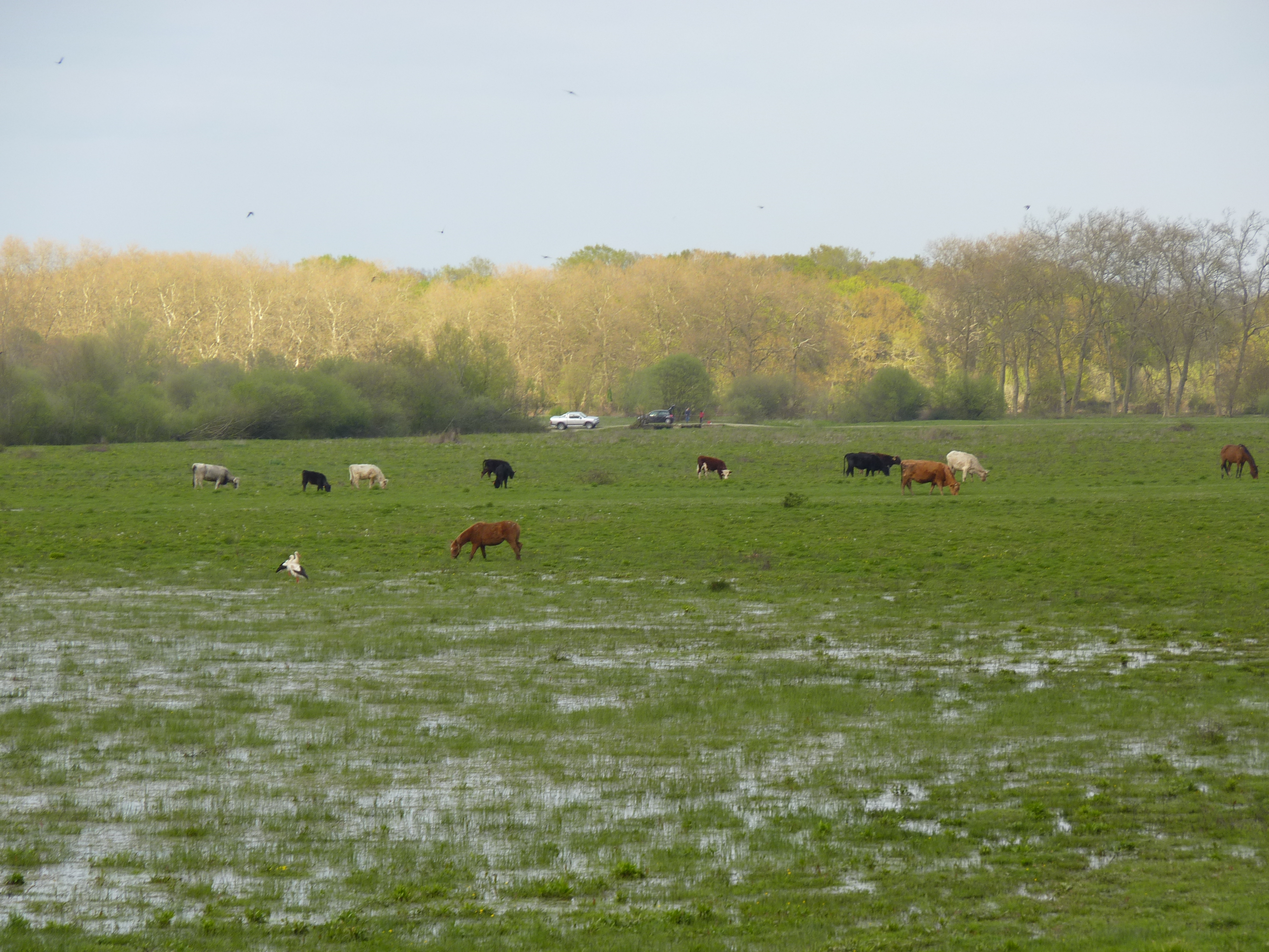 Pâturages des Barthes de l'Adour à Saint-Vincent-de-Paul